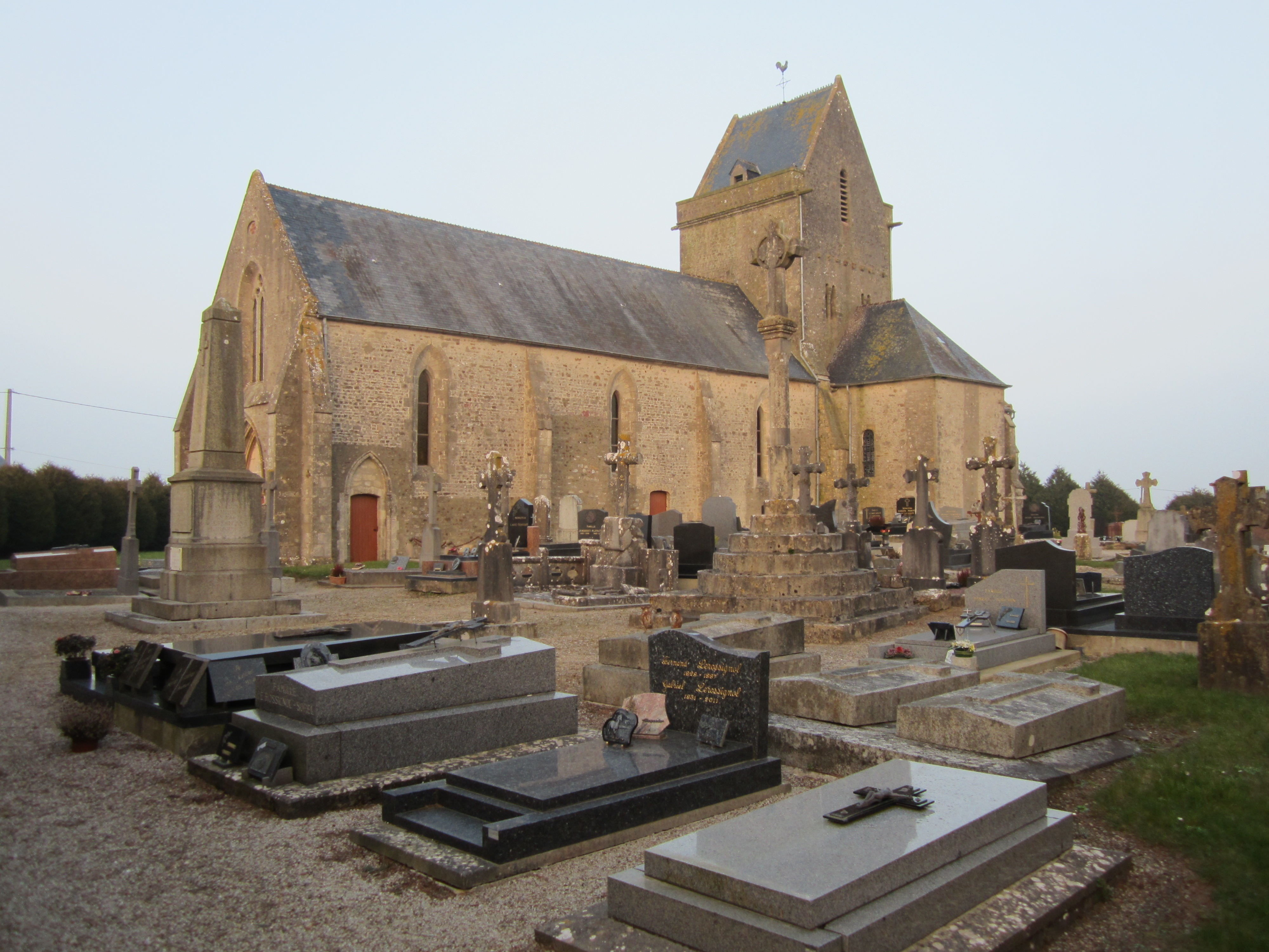 église Saint-Floxel de Saint-Floxel